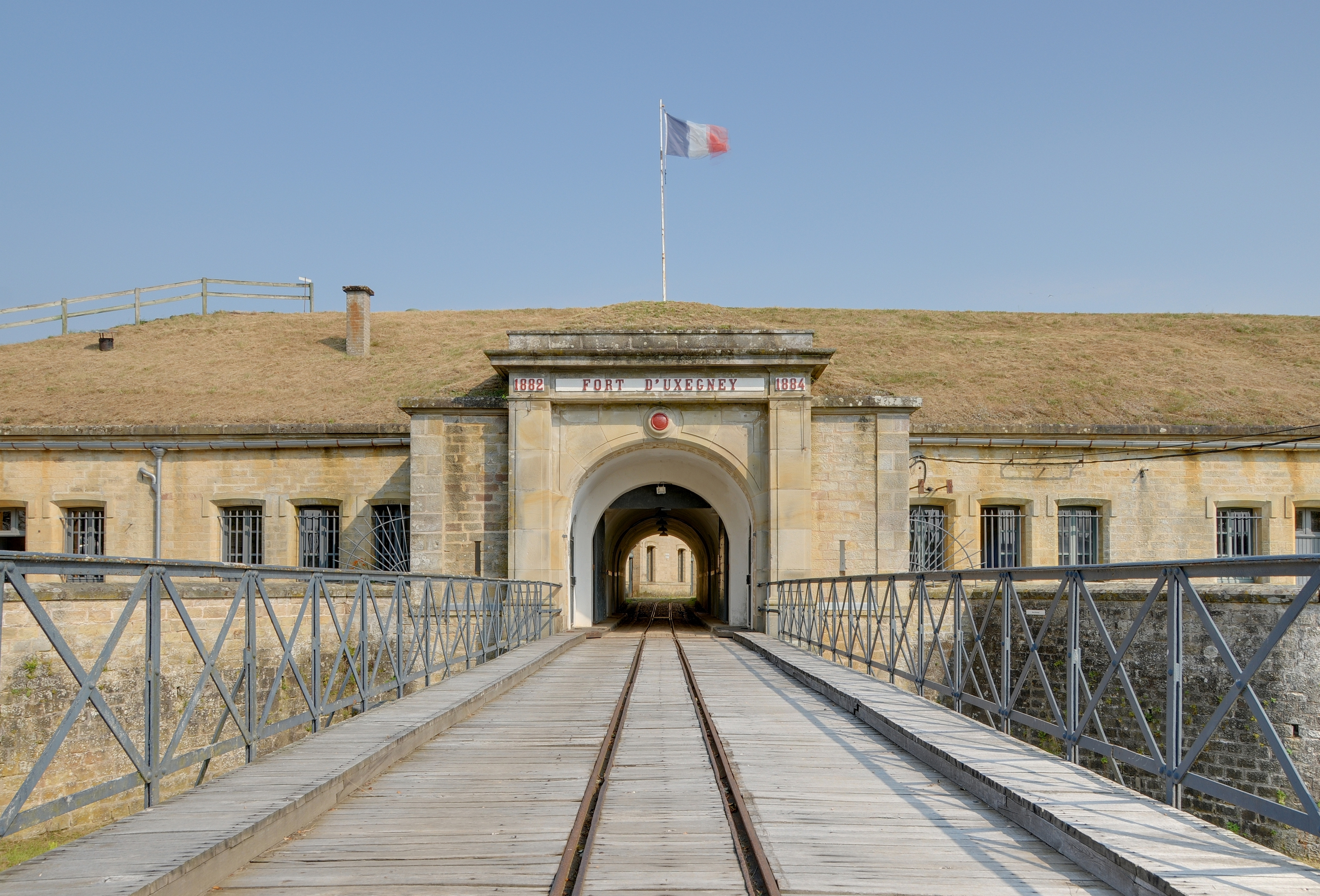 Fort d'Uxegney : L'entrée principale (HDR).